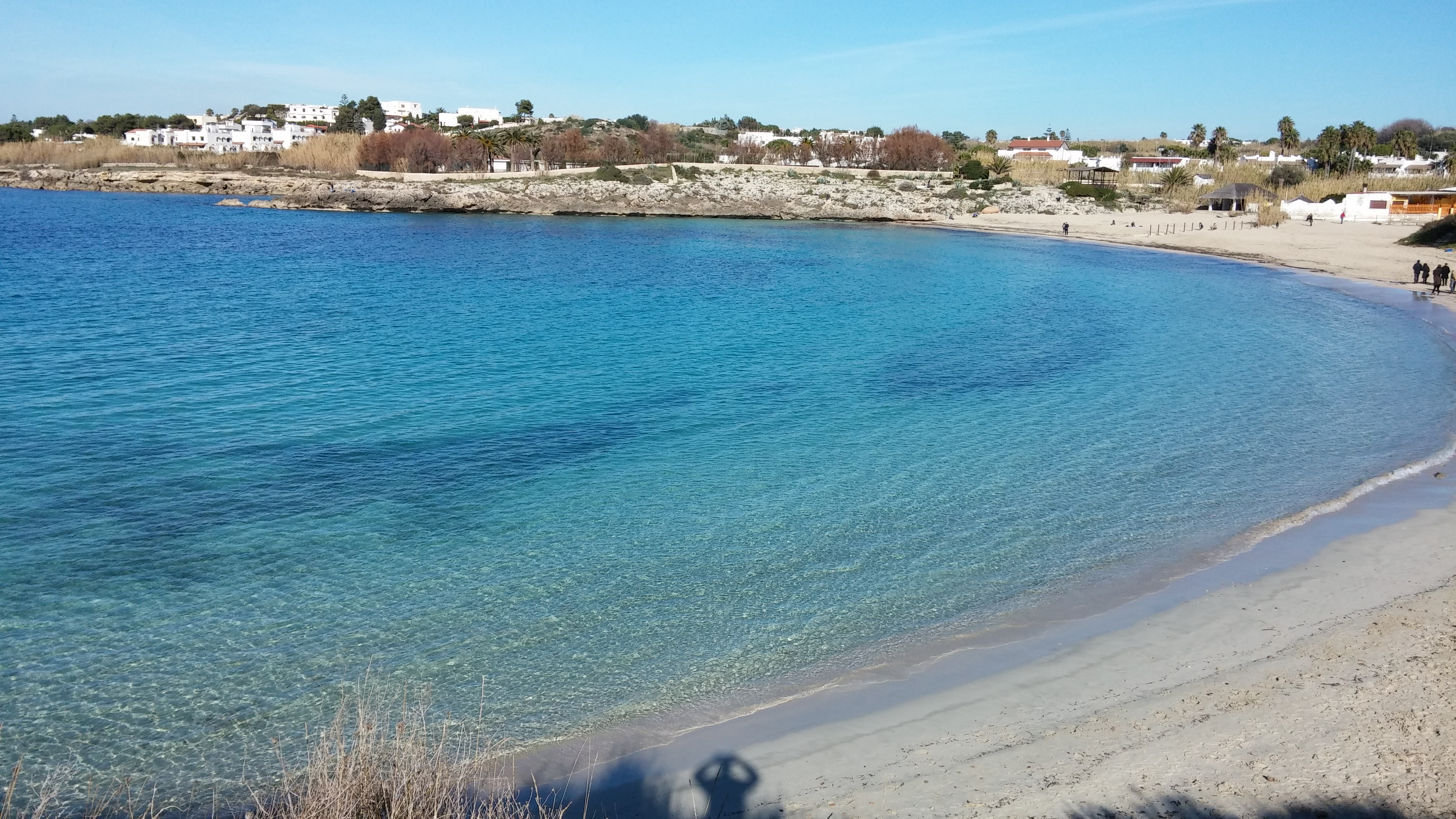 Spiaggia di Saturo